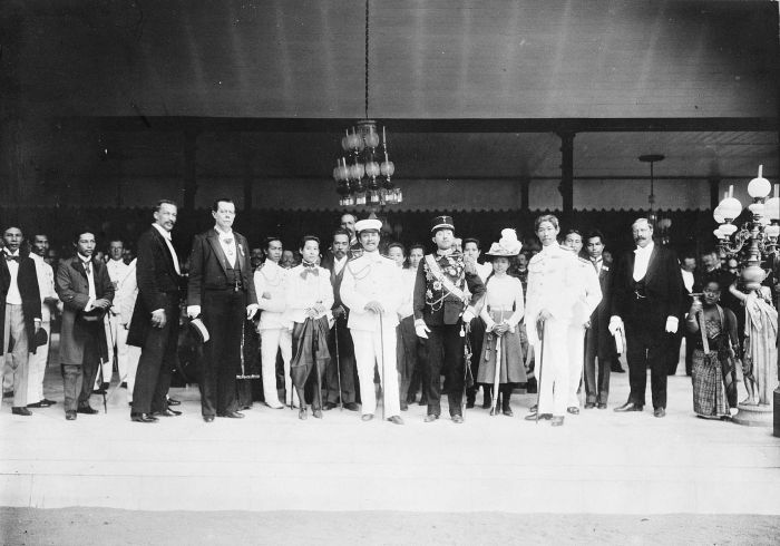 Foto. Groepsportret tijdens een bezoek van Koning Chulalongkorn van Siam aan Pakoe Boewono X, de Susuhunan van Solo